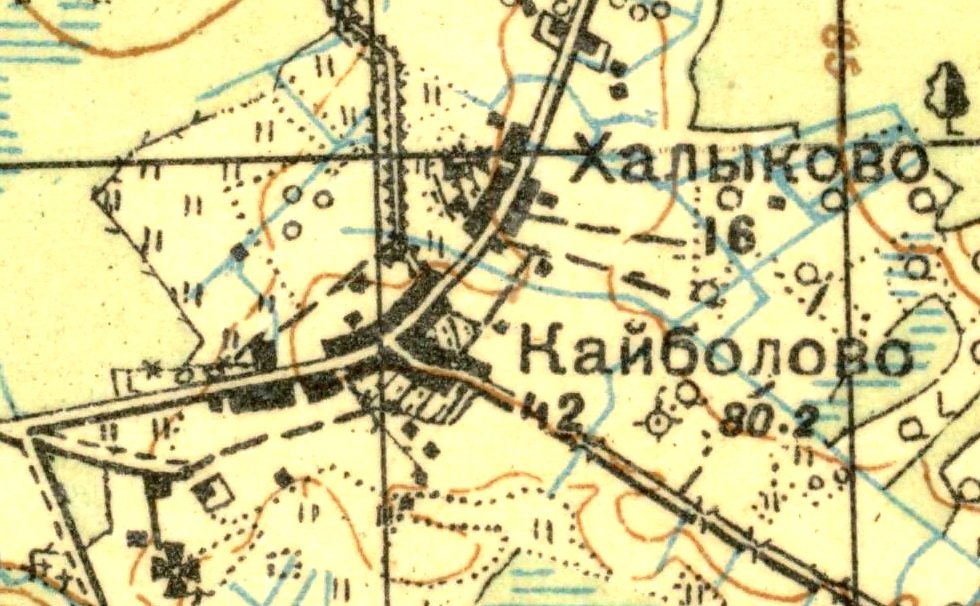 Топографическая карта Ленинградской области, квадрат О-36-14-А (п. Фёдоровский), деревня Кайболово